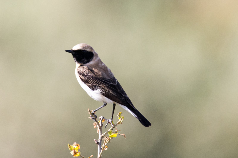 oostelijke-blonde-tapuit-3-2.jpg